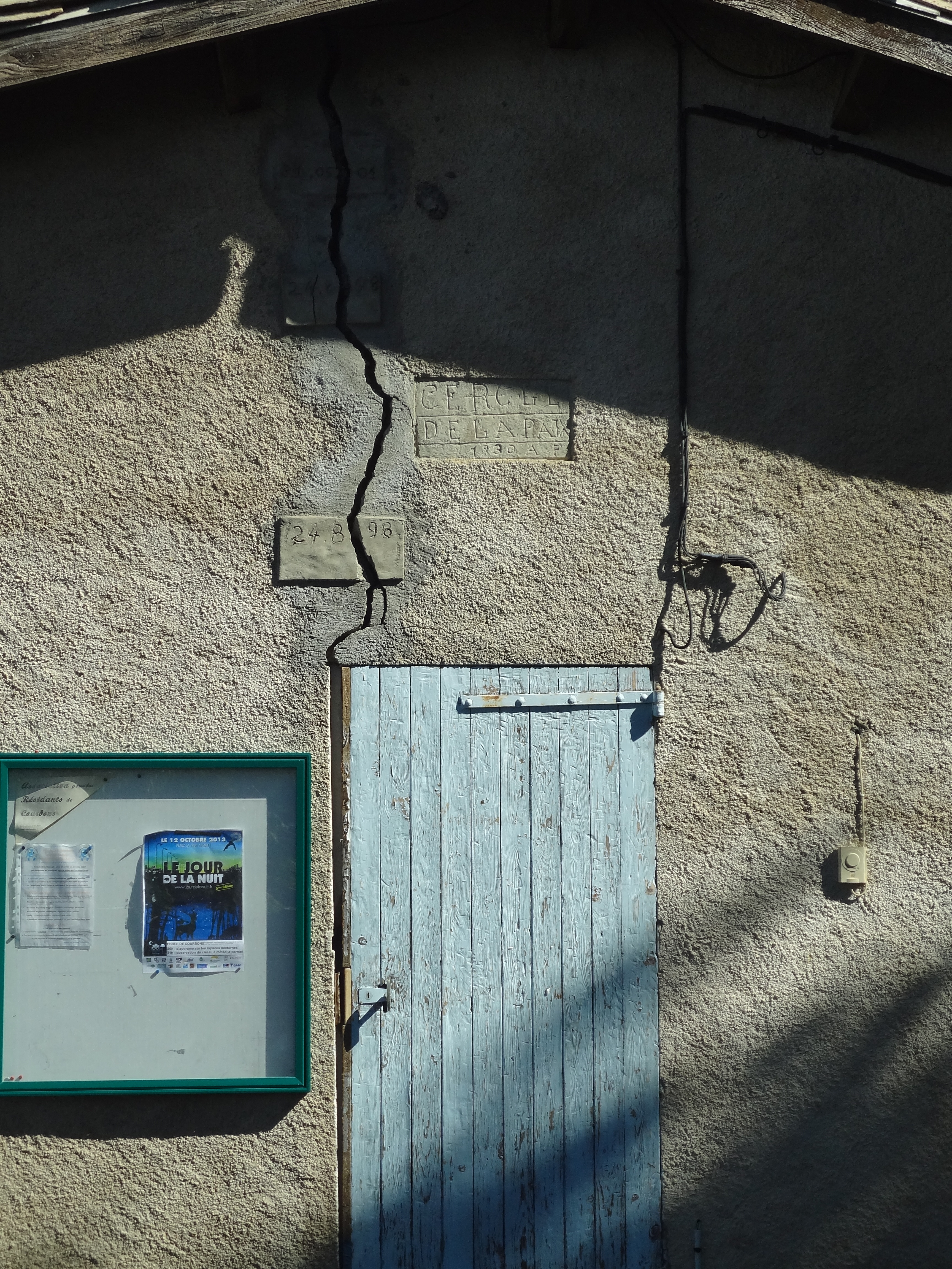 Cercle de la paix, chambrette de la commune de Courbons, avec chronogramme 1930 et 24 août [19]98